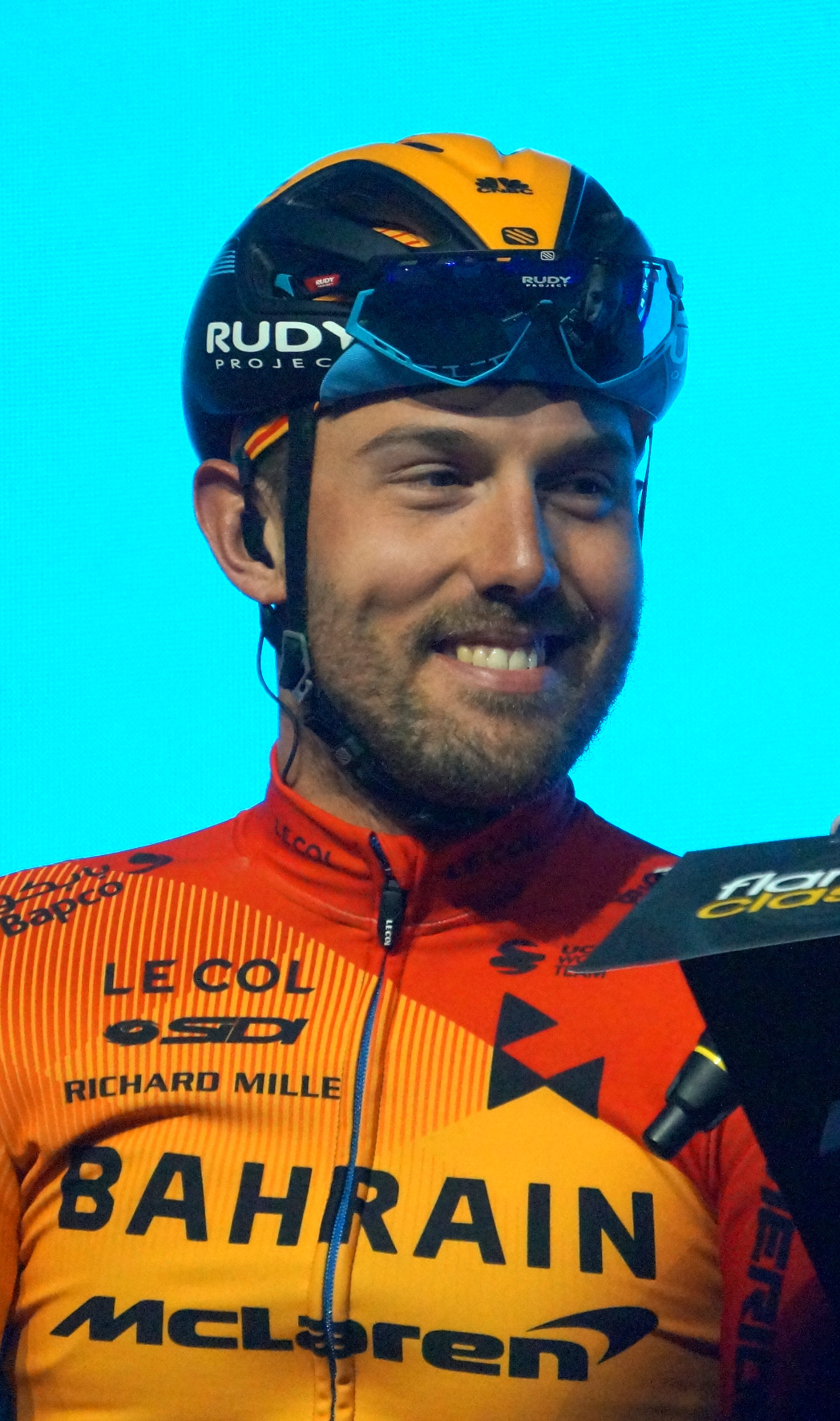 Sonny Colbrelli bij de ploegenvoorstelling in Gent voor de Omloop Het Nieuwsblad 2020